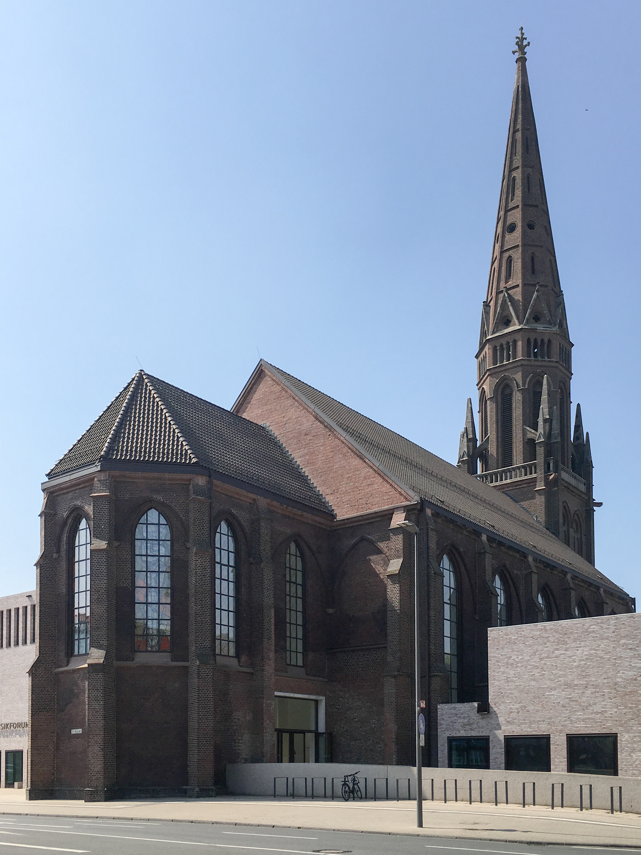 Umgewidmete St.-Marien-Kirche in Bochum - heute als Foyer Teil Konzerthauses Anneliese Brost Musikforum Ruhr